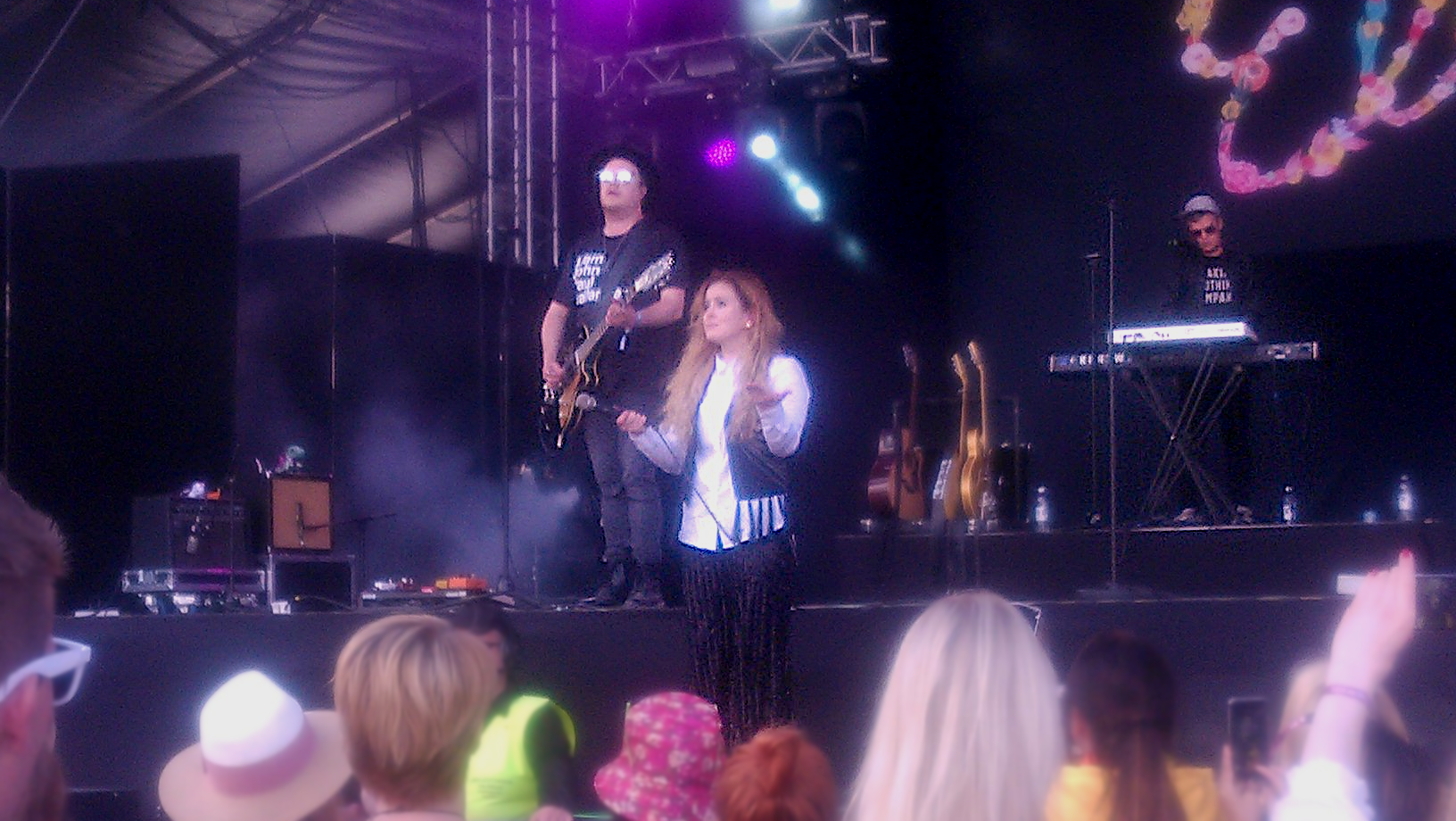 Ellinoora esiintymässä Tammerfestilla lauantaina 22.07.2017